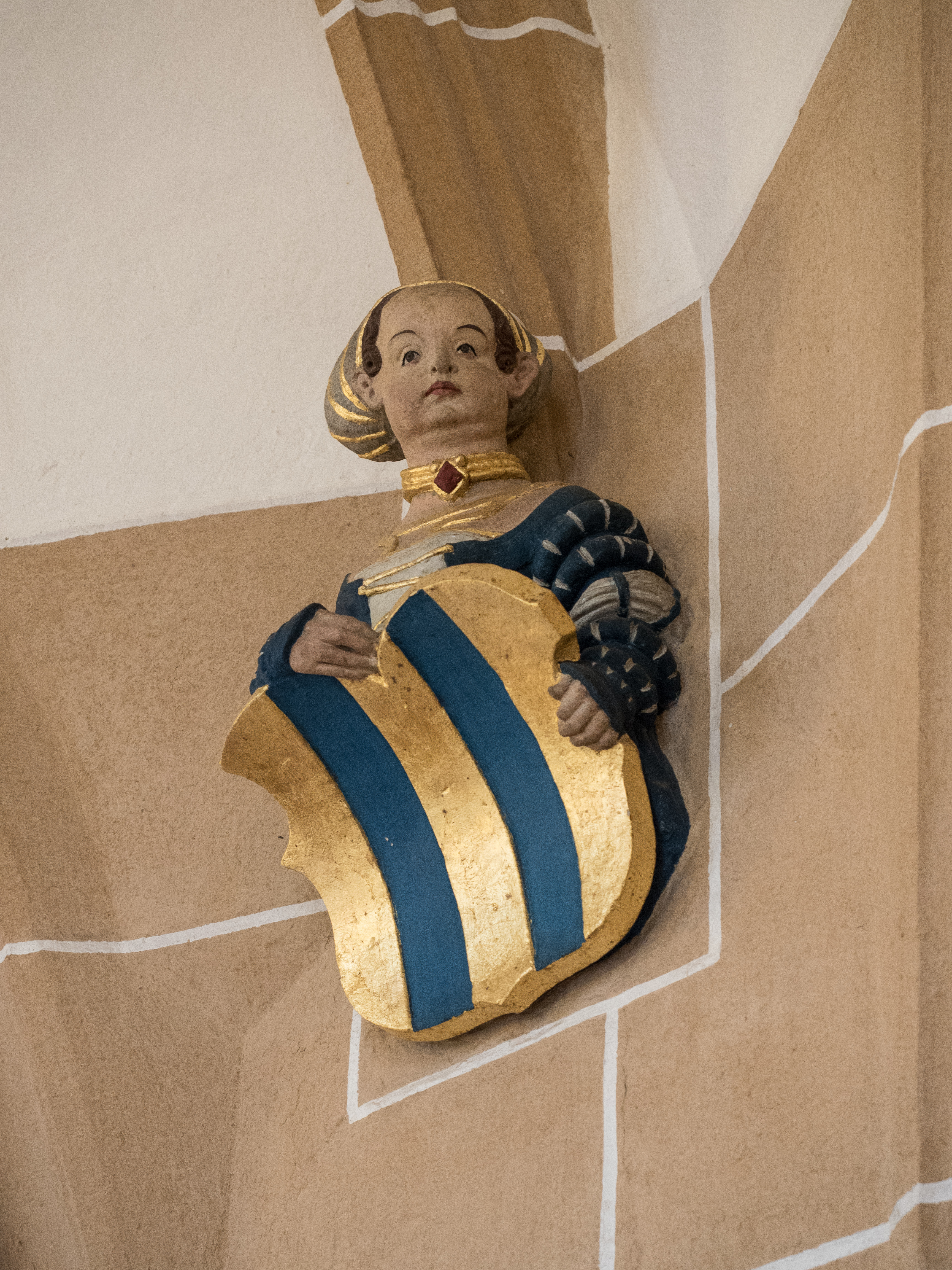 Wappenhalterin im Wappensaal der Albrechtsburg in Meißen, 1524 von dem Bildhauer Christoph Walther I ausgeführt